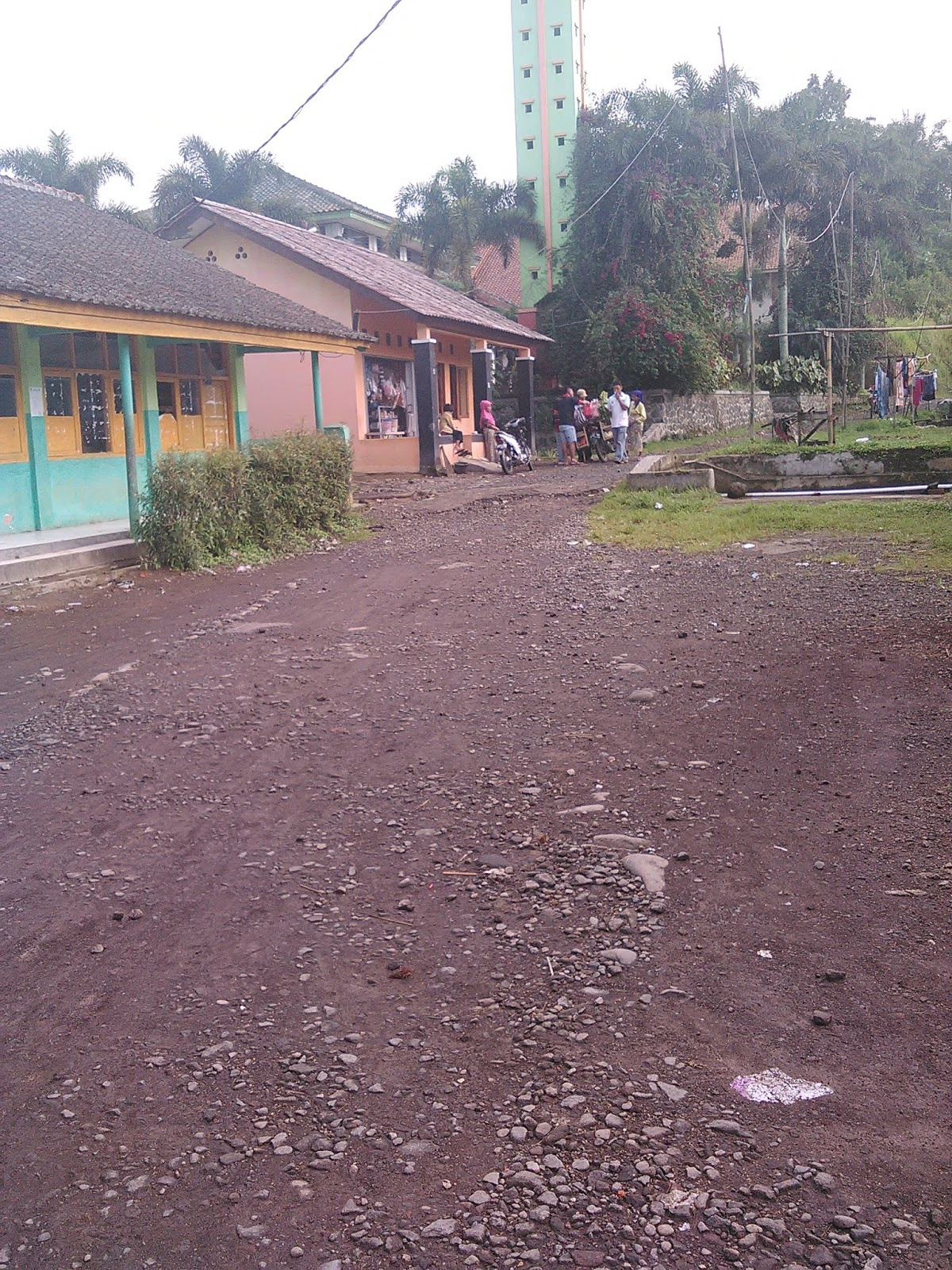 Wajah Kampung Cisitu yang masih jauh dari keramaian